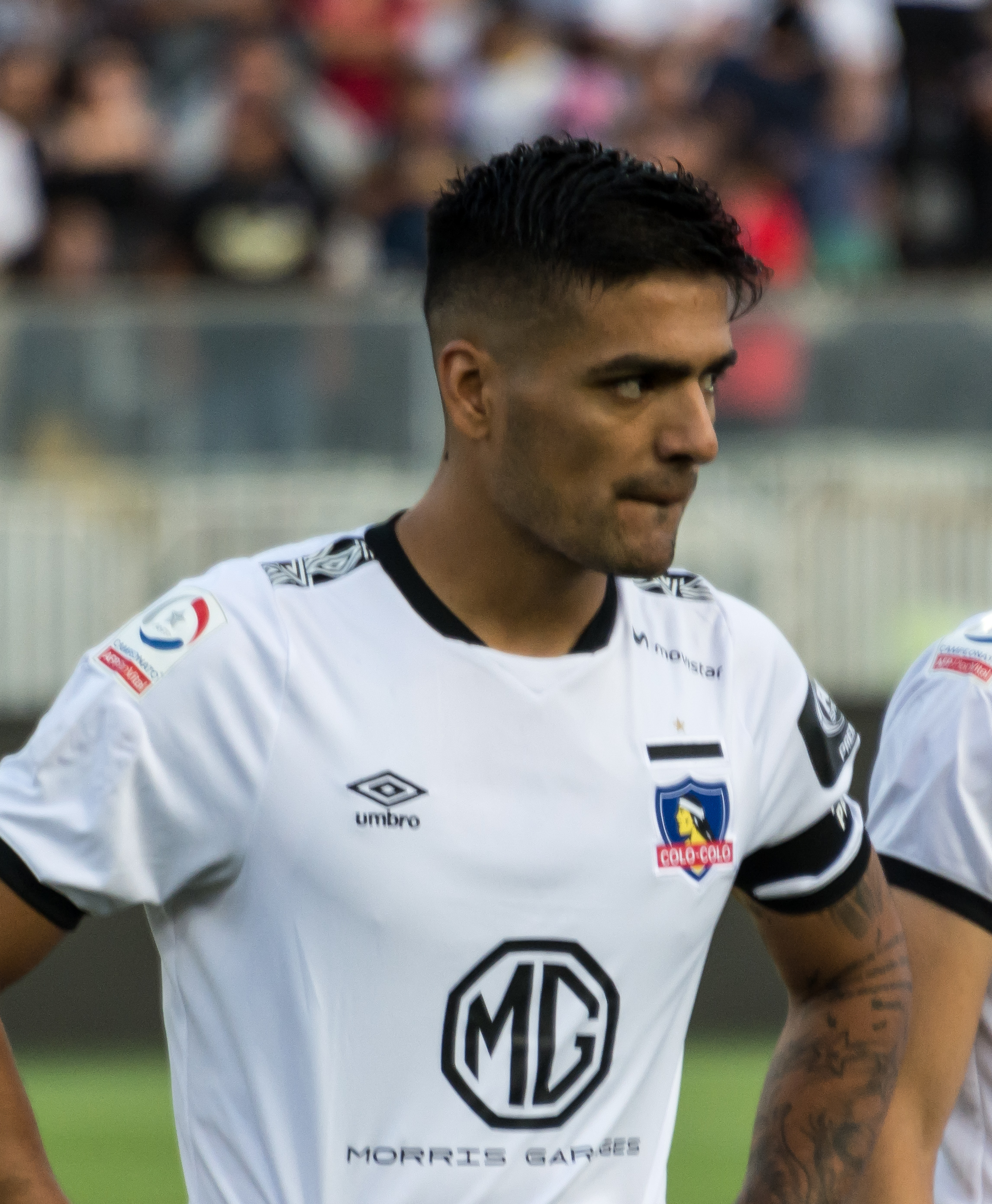 Colo-Colo v Palestino, Estadio Monumental, Macul, Santiago, Región Metropolitana, Chile